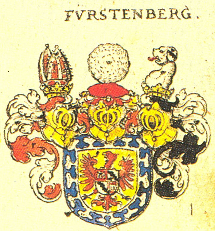 Johann Siebmacher: New Wappenbuch Grafen Fürstenberg